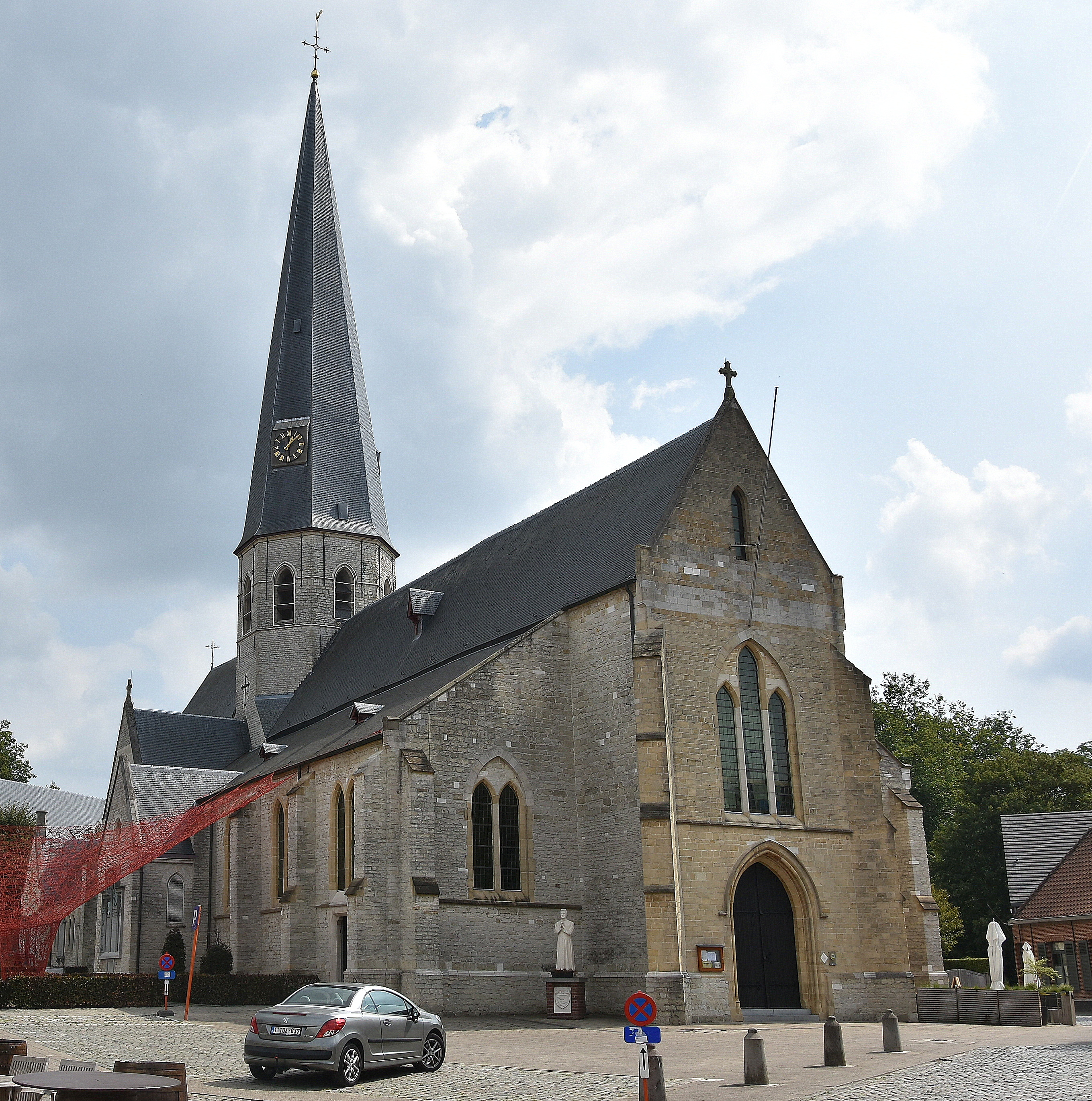 Sint-Petruskerk (Bazel) 21-08-2018 This photo of immovable heritage has been taken in the Flemish Region